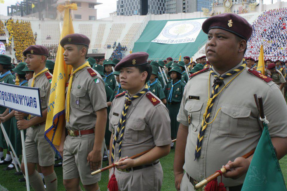 แชมป์ประกวดสวนสนาม